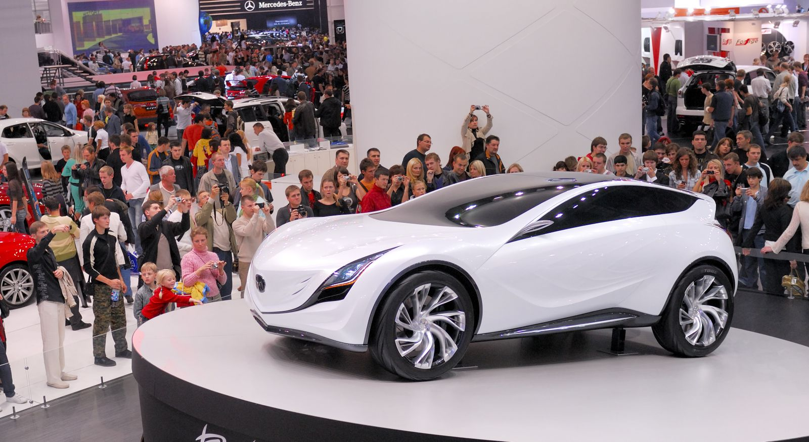 Moscow International Automobile Salon 2008